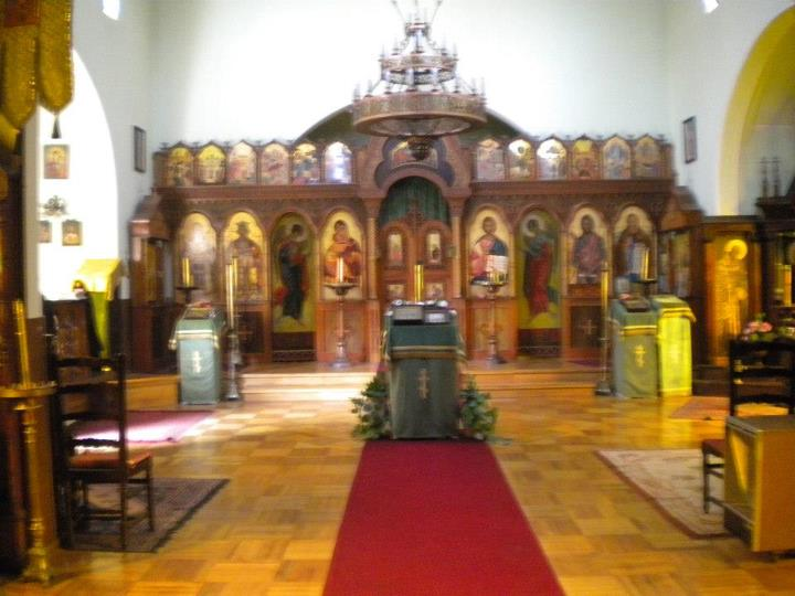 Prebisterio